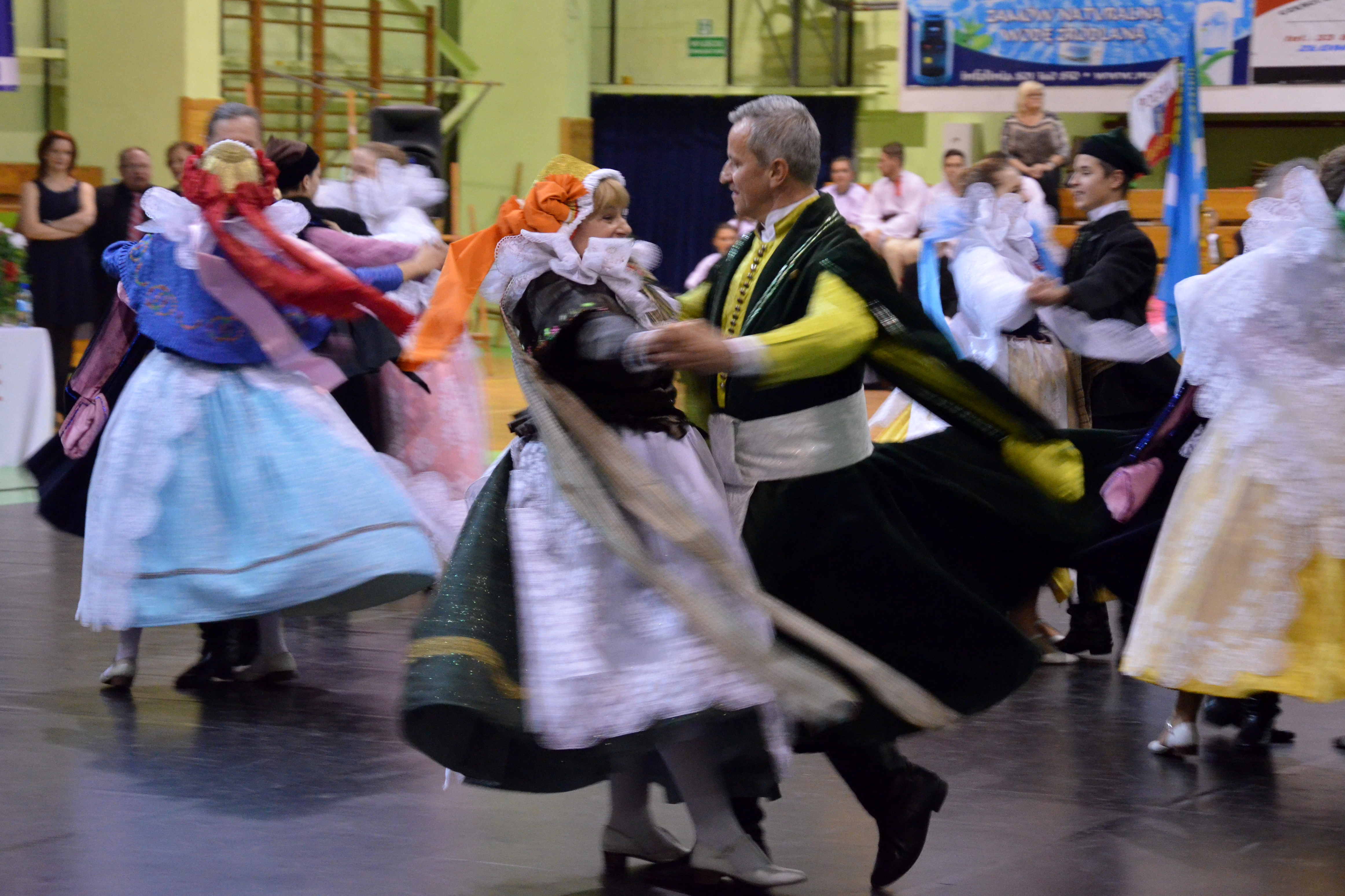 Die Saybuscher Quadrille (Tanz).